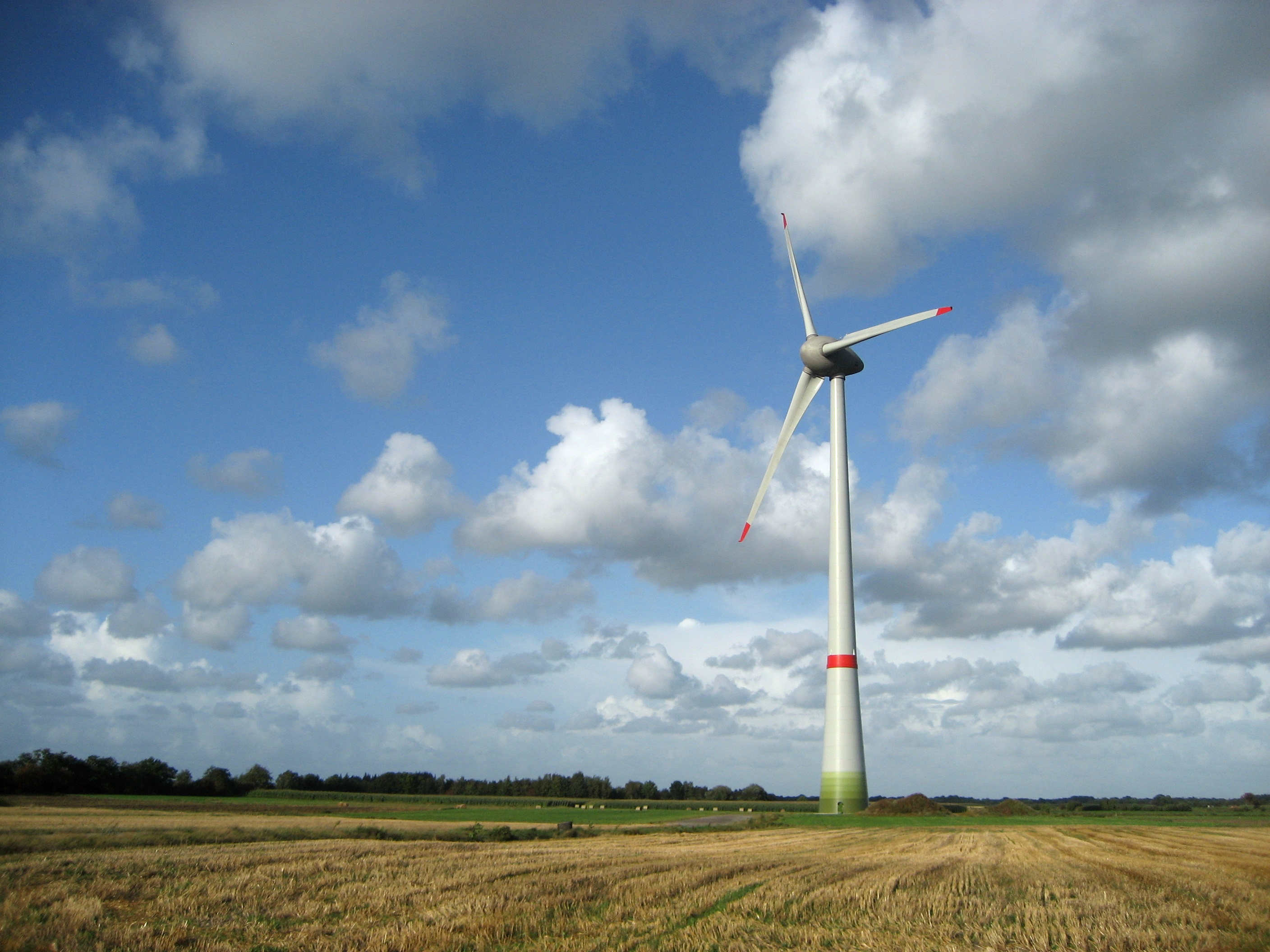 Enercon E 126, 6MW Windenergieanlage (WEA) in Georgsfeld (nähe Aurich), Bauherr: Bürgerwindpark Georgsfeld GmbH & Co KG, Nabenhöhe 135m, Rotordurchmesser 126m, Gesamthöhe 198m